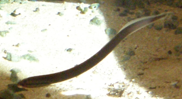 Riserva Naturale delle Sorgenti del Pescara eine Bachneunauges (Lampetra planeri)